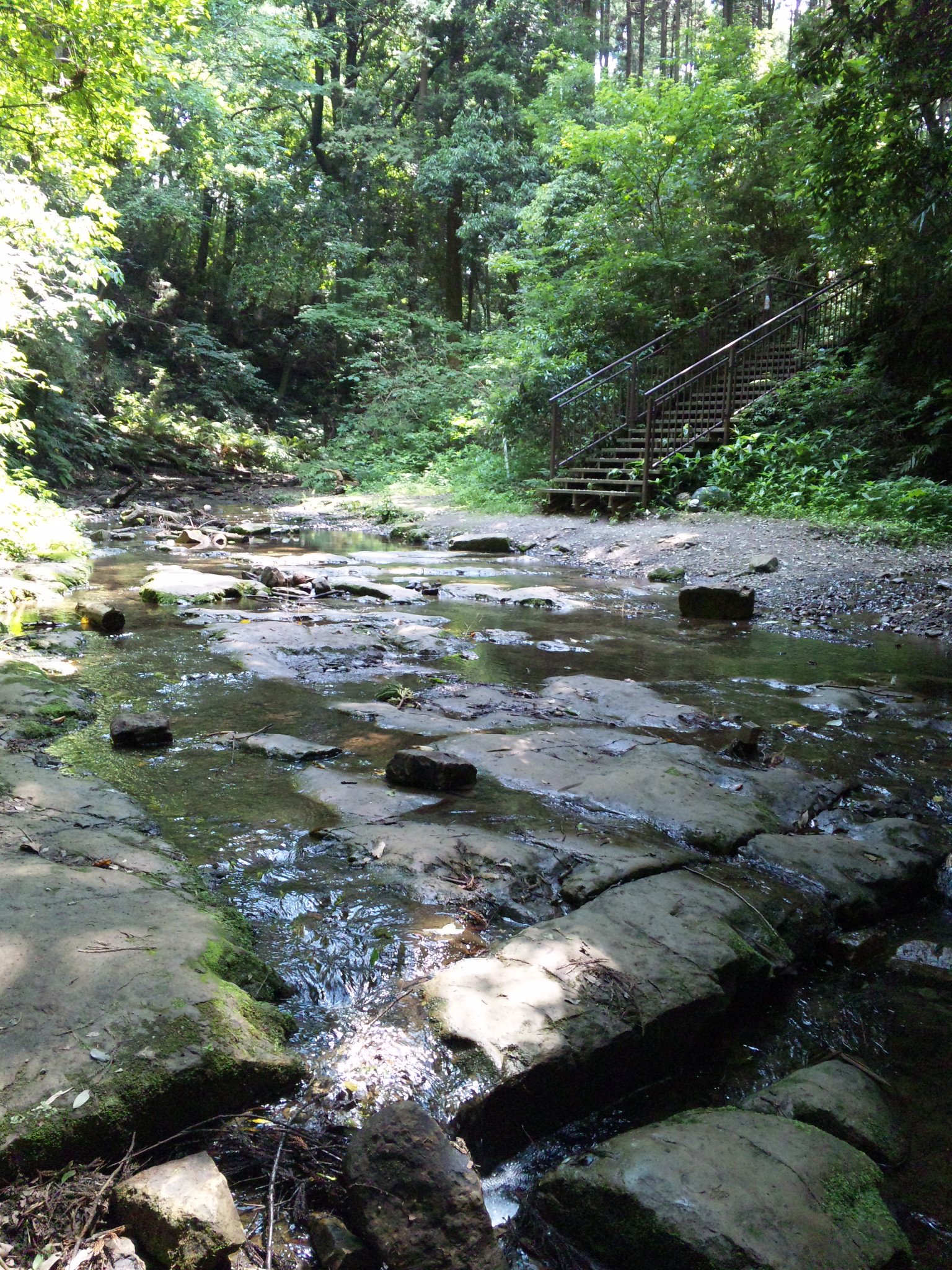 陣ケ下渓谷横浜市保土ヶ谷区